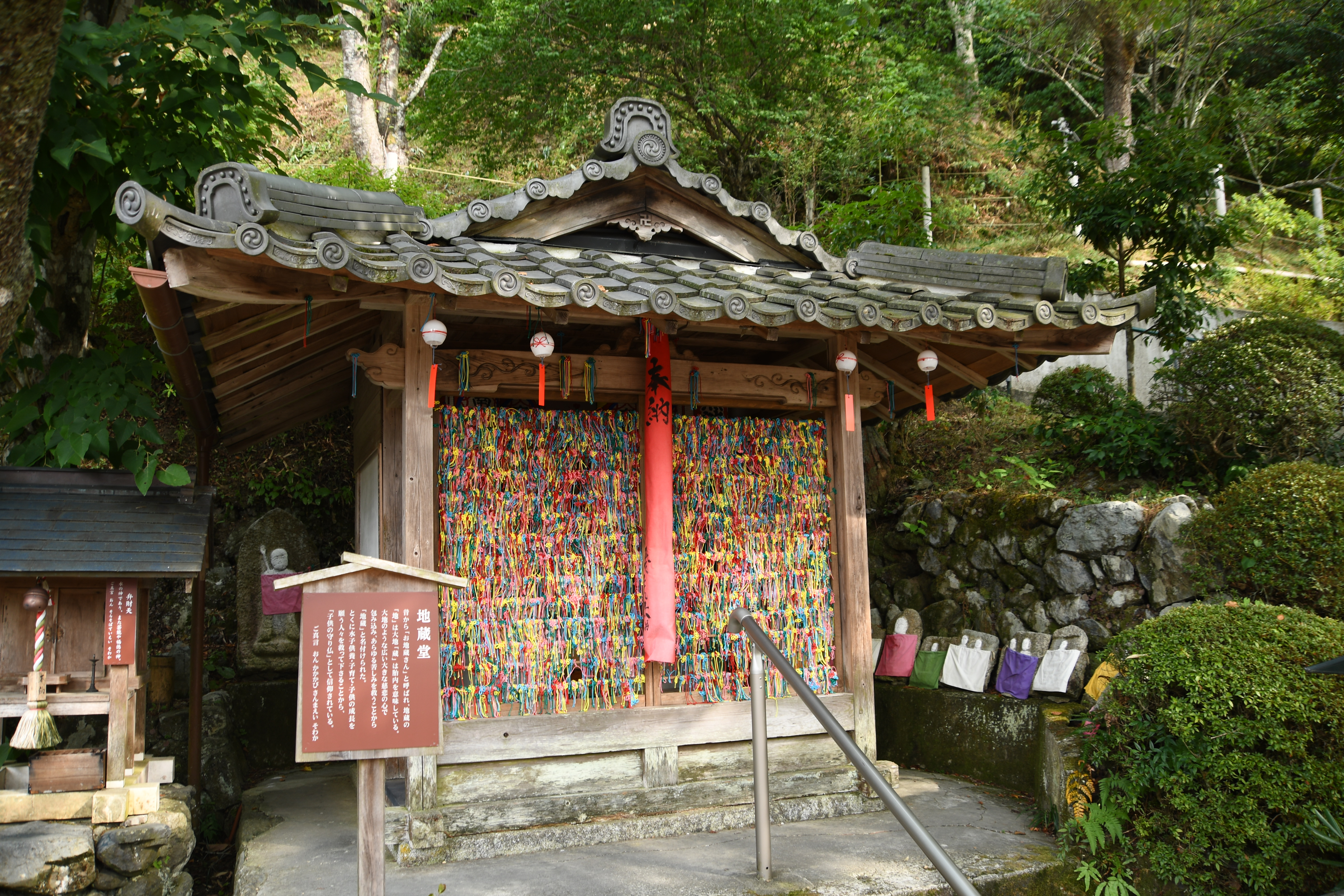 京都府宇治田原町奥山田 正寿院 地蔵堂。2018年8月11日撮影。